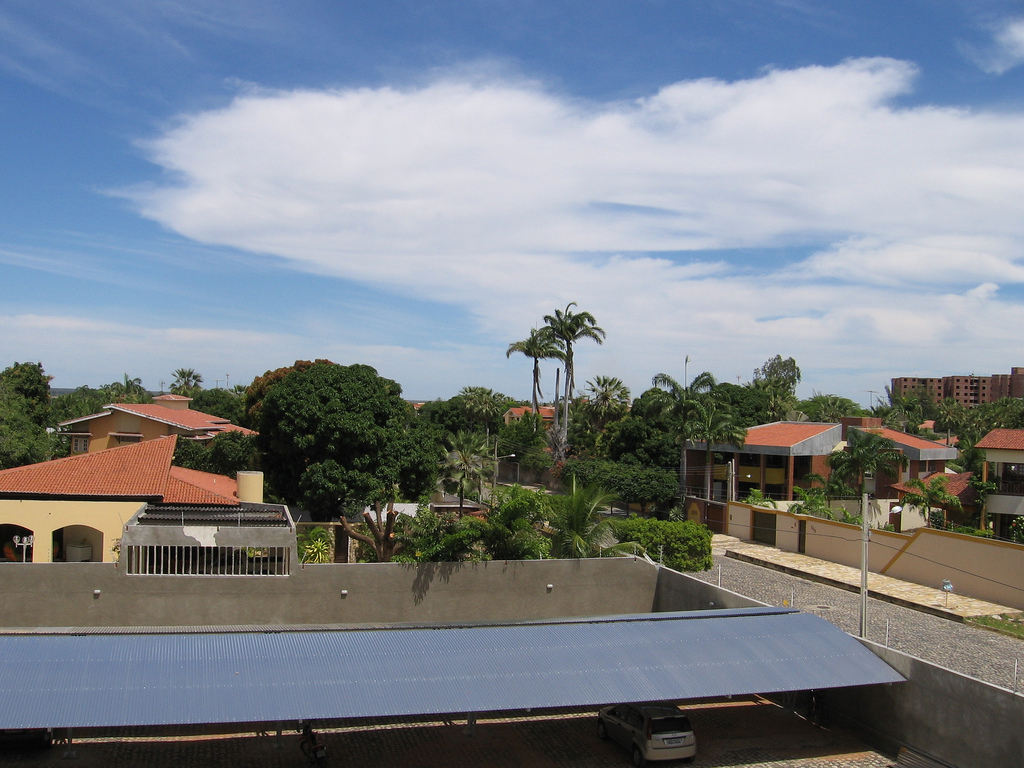 Bairro Nova Betania em Mossoró/RN/Brasil.